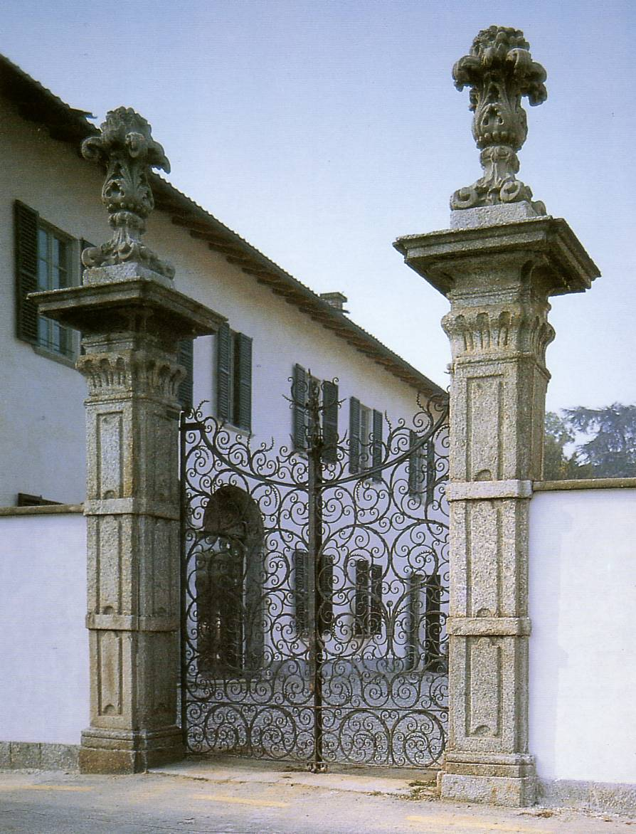 Villa D'Adda-Mariani, sita in via Buttafava a Galgiana (frazione di Casatenovo)